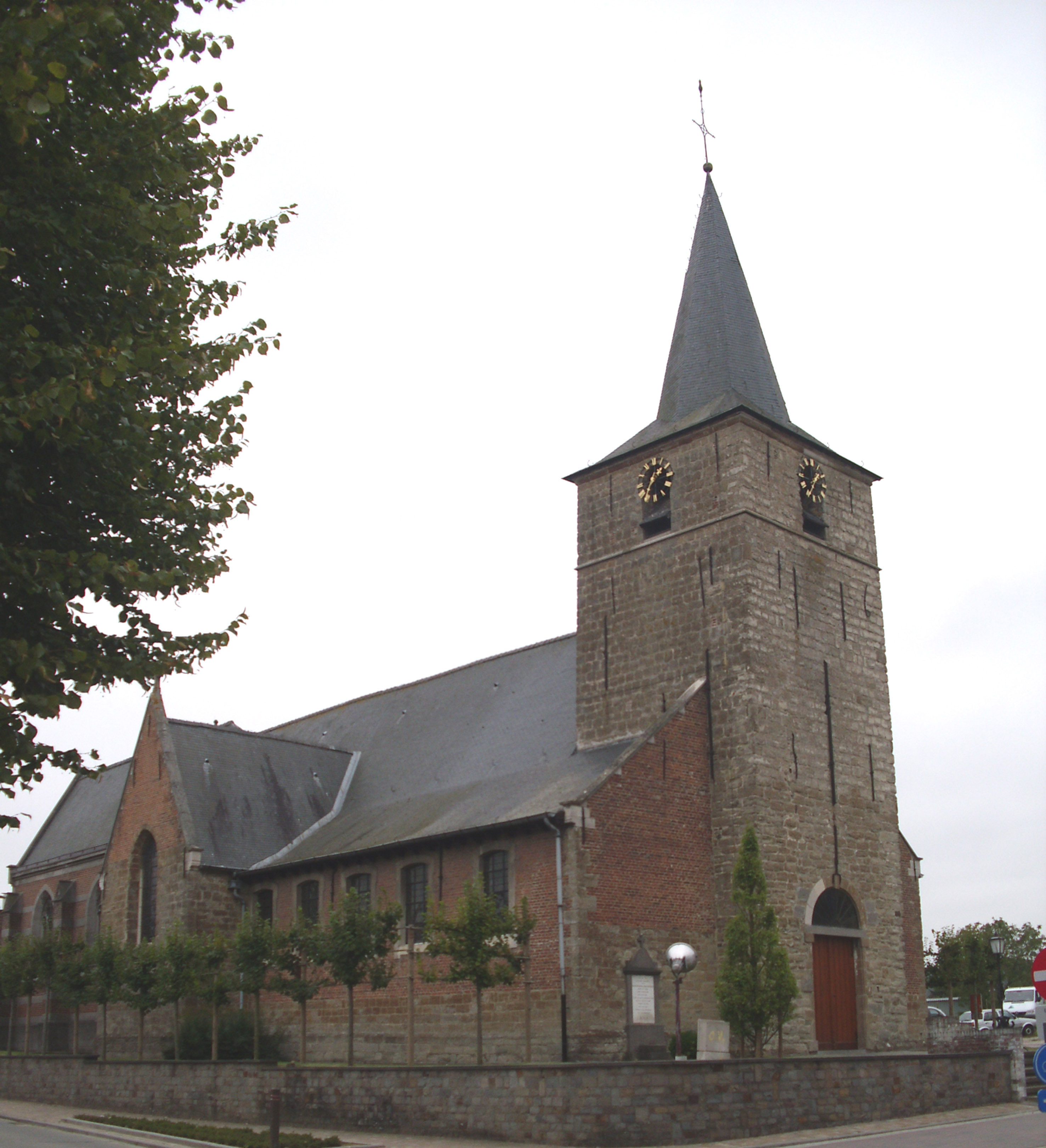 Kerk van Deftinge - Lierde - Oost-Vlaanderen - Vlaanderen - België